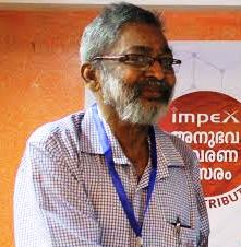 ബാബു ഭരദ്വാജ്